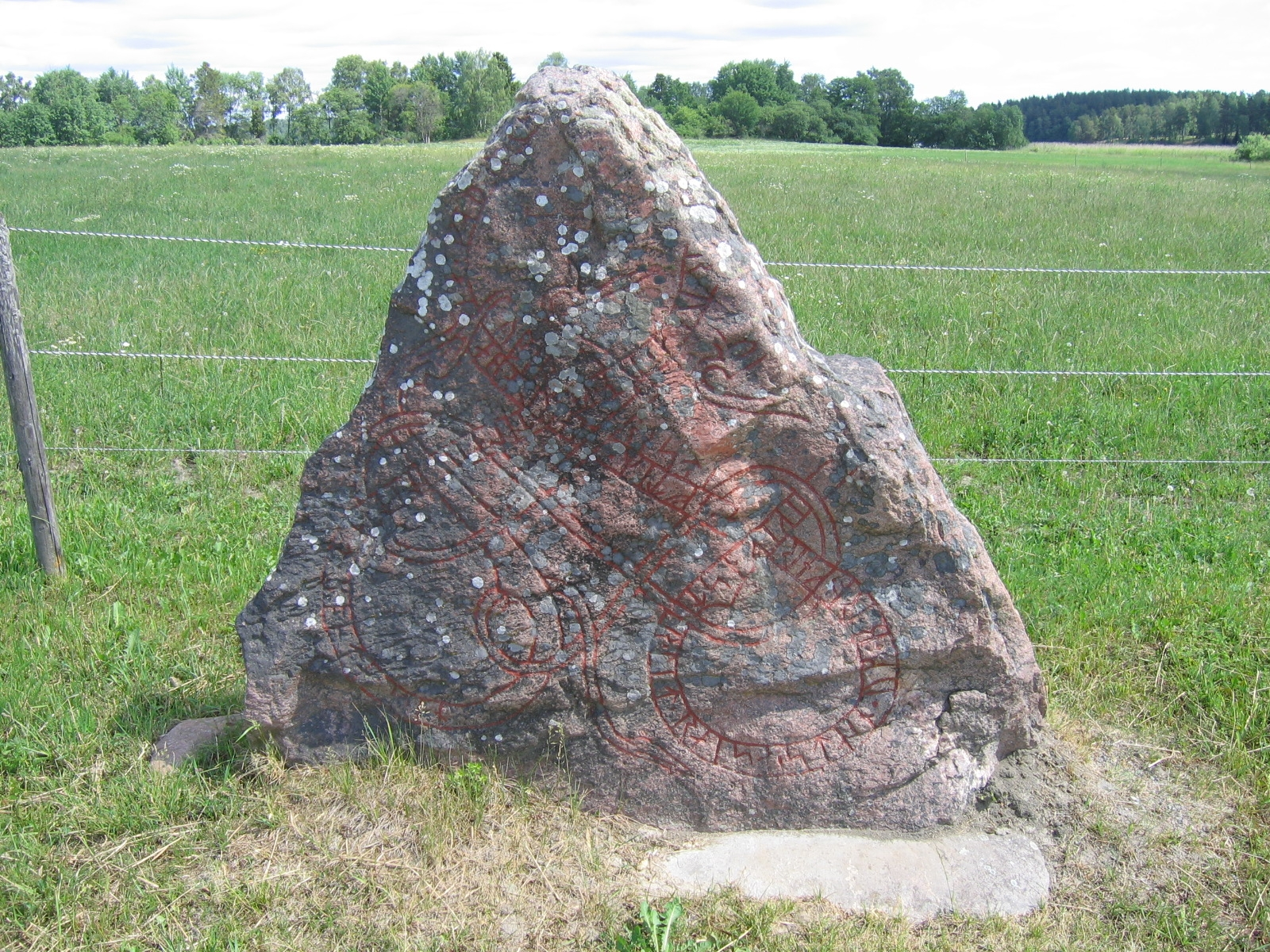 runestone U 142 in Fällbro, Täby.